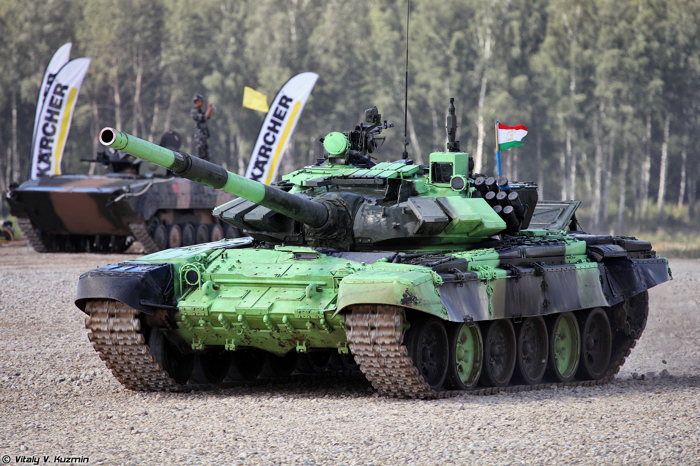 Т-72Б3 команды Таджикистана (Tadjikistan team T-72B3)